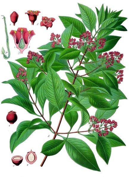 Sandelholzbaum. A blühender Zweig. 1 Knospe; 2 geöffnete Blüten; 3 Blüte im Längsschnitt; 3a Ende des Embryosackes zur Zeit der Befruchtung; 4 Frucht; 5 dieselbe im Querschnitt; 6 dieselbe im Längsschnitt. A natürliche Grösse; 1—6 mehr oder weniger vergrössert.